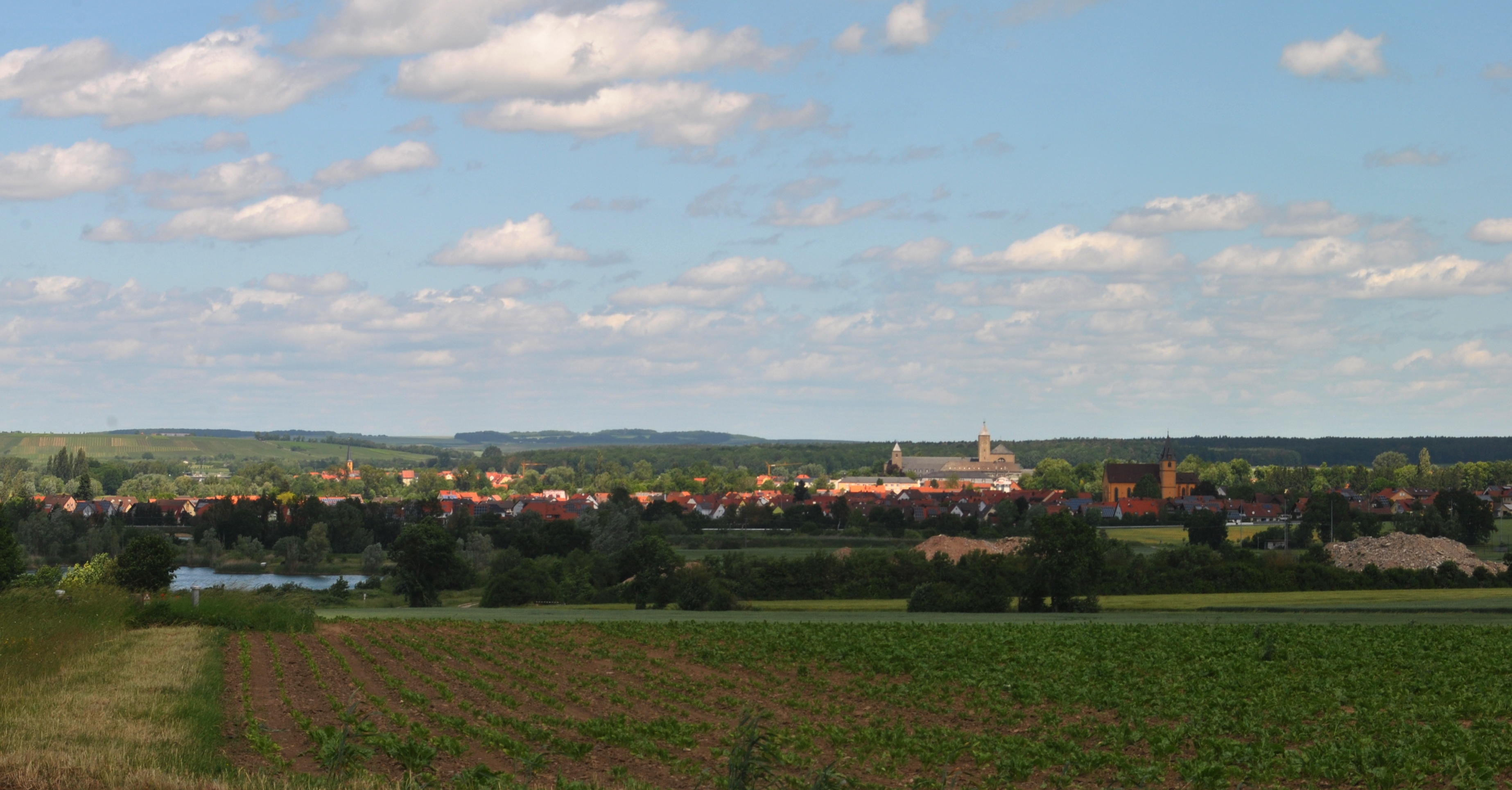 Schwarzacher Becken: beckenartige Maintalweitung, Naturraum im Mittleren Maintal Von links nach rechts: Gerlachshausen, Münsterschwarzach mit Kloster Münsterschwarzach, Stadtschwarzach; im Vordergrund links: Hörblacher Seen